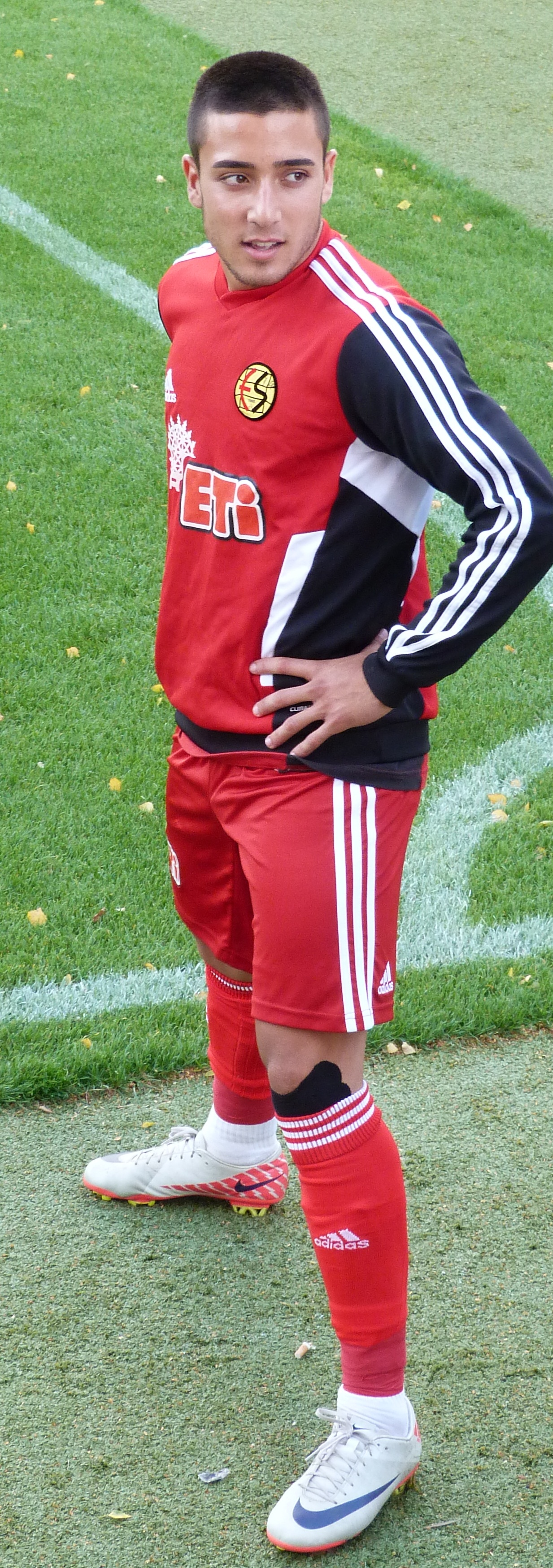 Tarik